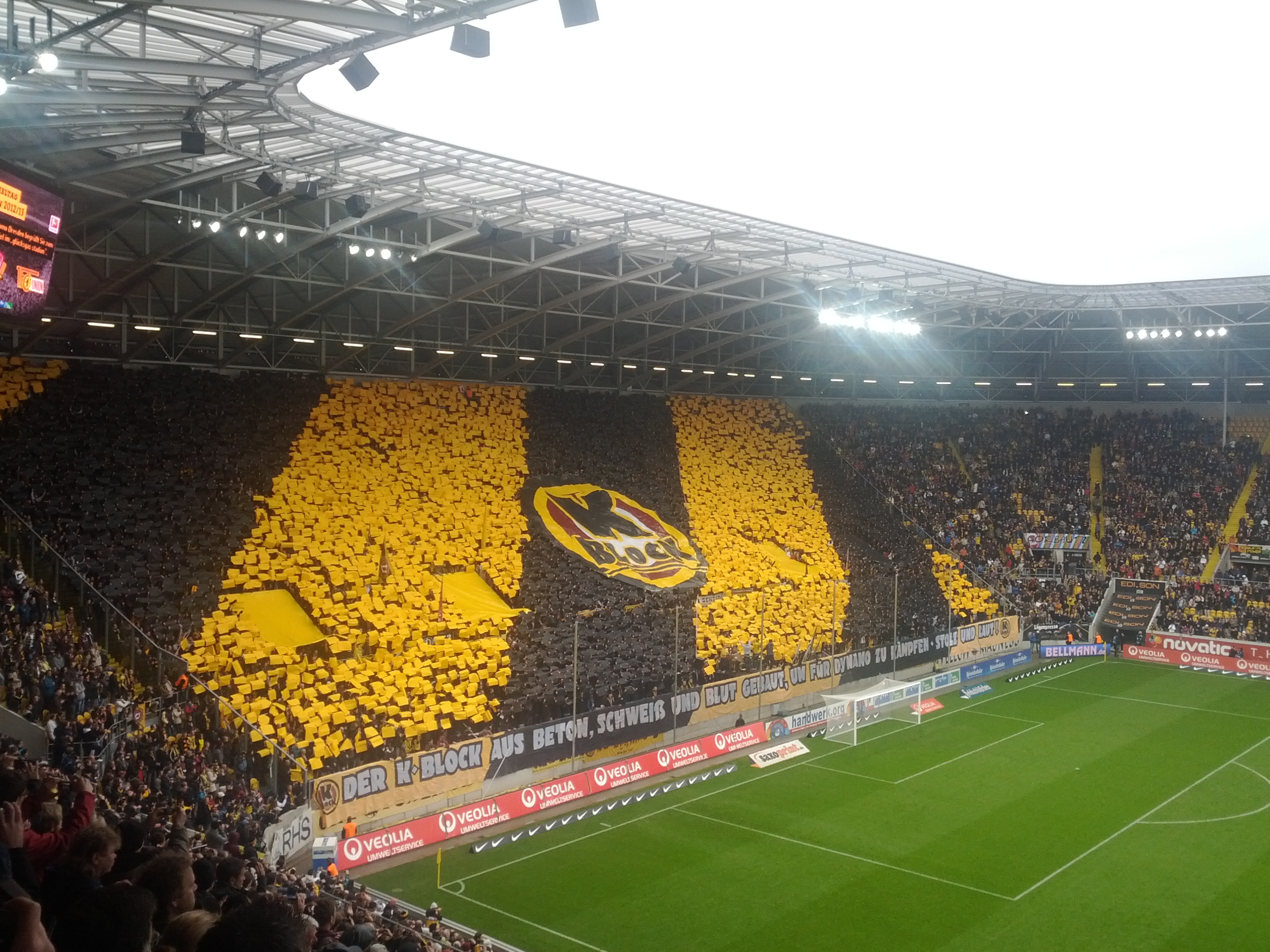 Fan-Choreographie im K-Block von Dynamo Dresden, gegen Union Berlin 2012/2013